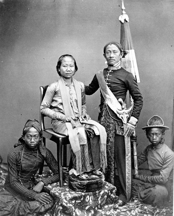 Foto. Djaksa, een officier van justitie uit Bandoeng, met vrouw en bedienden.